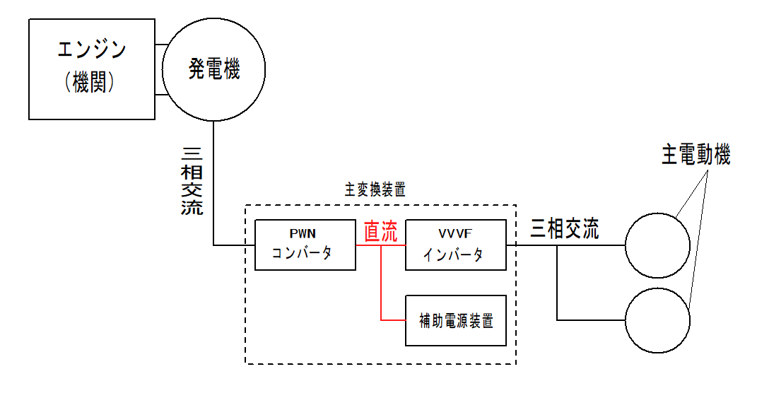 GV-E400系気動車の主回路の見取り図